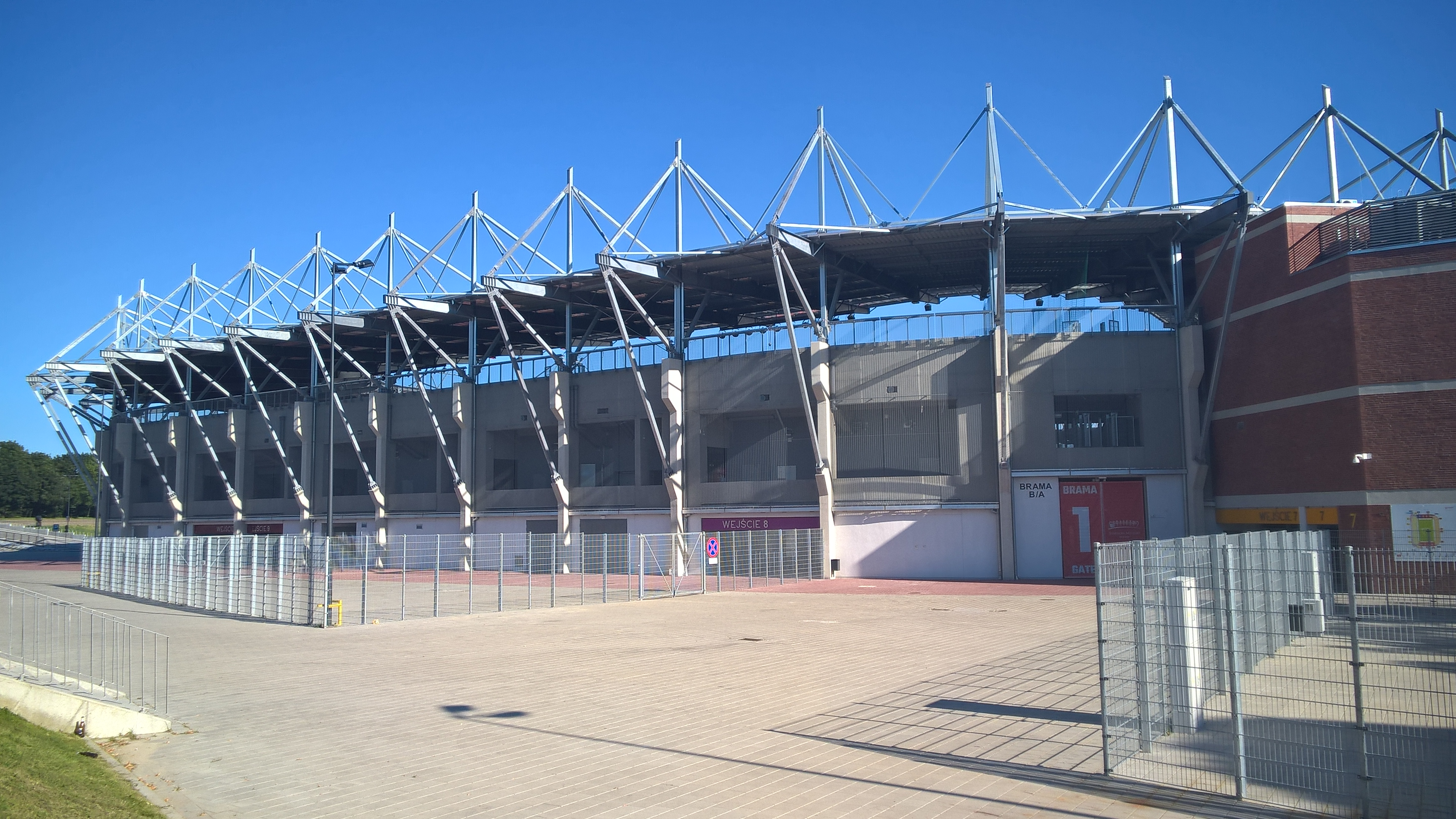 Nowy stadion Widzewa – trybuna B (lipiec 2017)